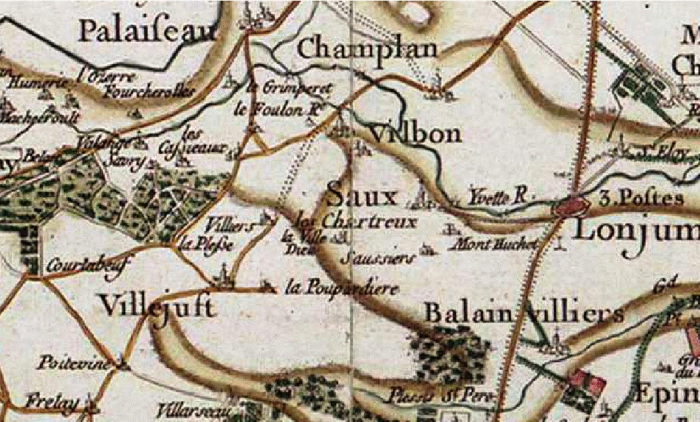 Carte selon Cassini de la région de Saulx-les-Chartreux